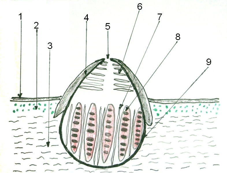 Perythecium